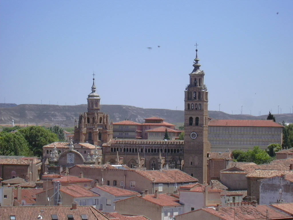 Tarazona - Catedral